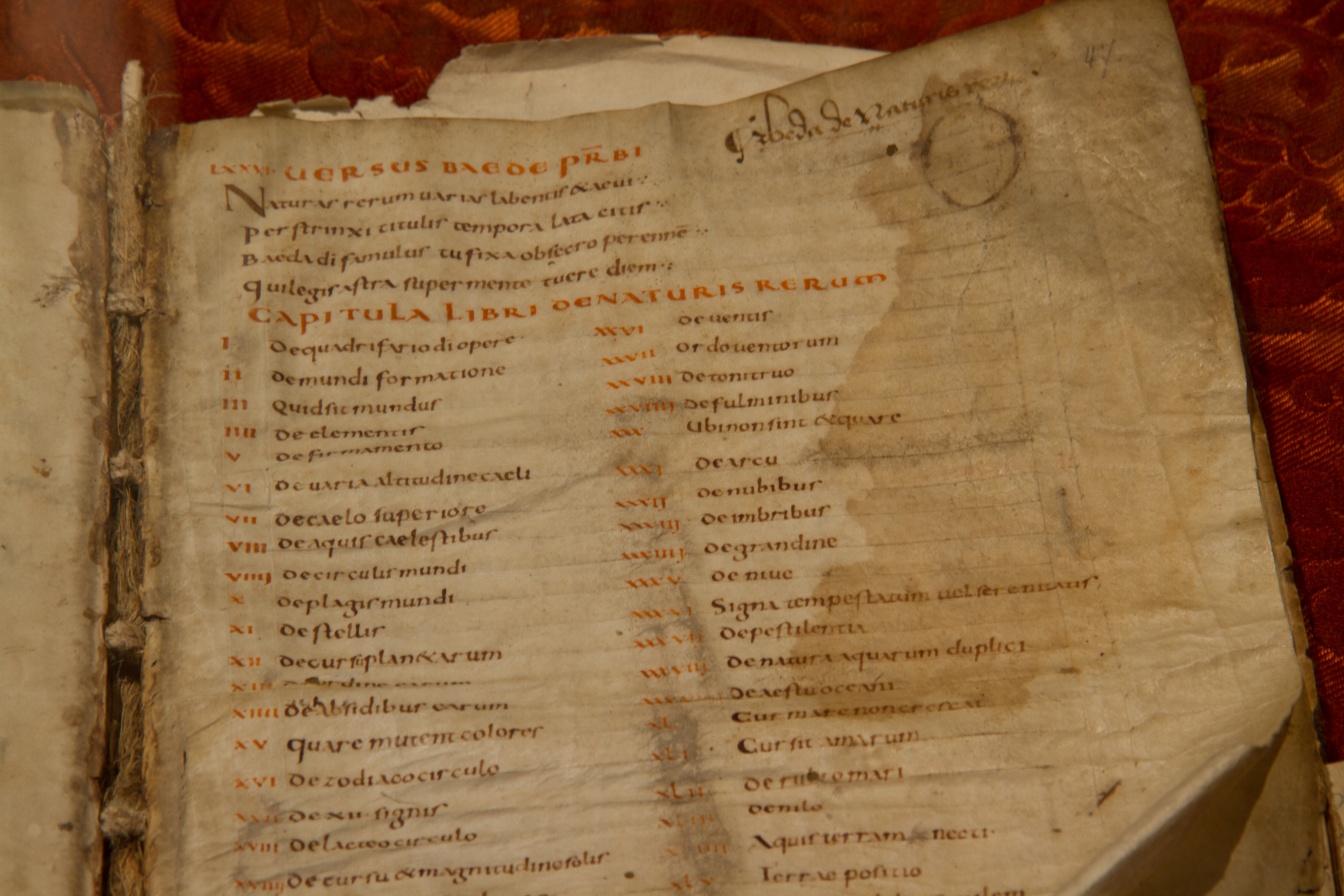 Bède le Vénérable, De naturis rerum (Ms 31/3), page de titre (IXe-Xe s.), à la bibliothèque du Grand Séminaire de Strasbourg. Conservateur : Louis Schlaefli.